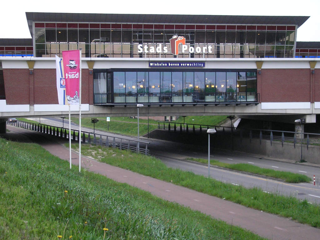 Traverse over Dr. W. Dreeslaan te Ede (winkelcentrum "Stads Poort")